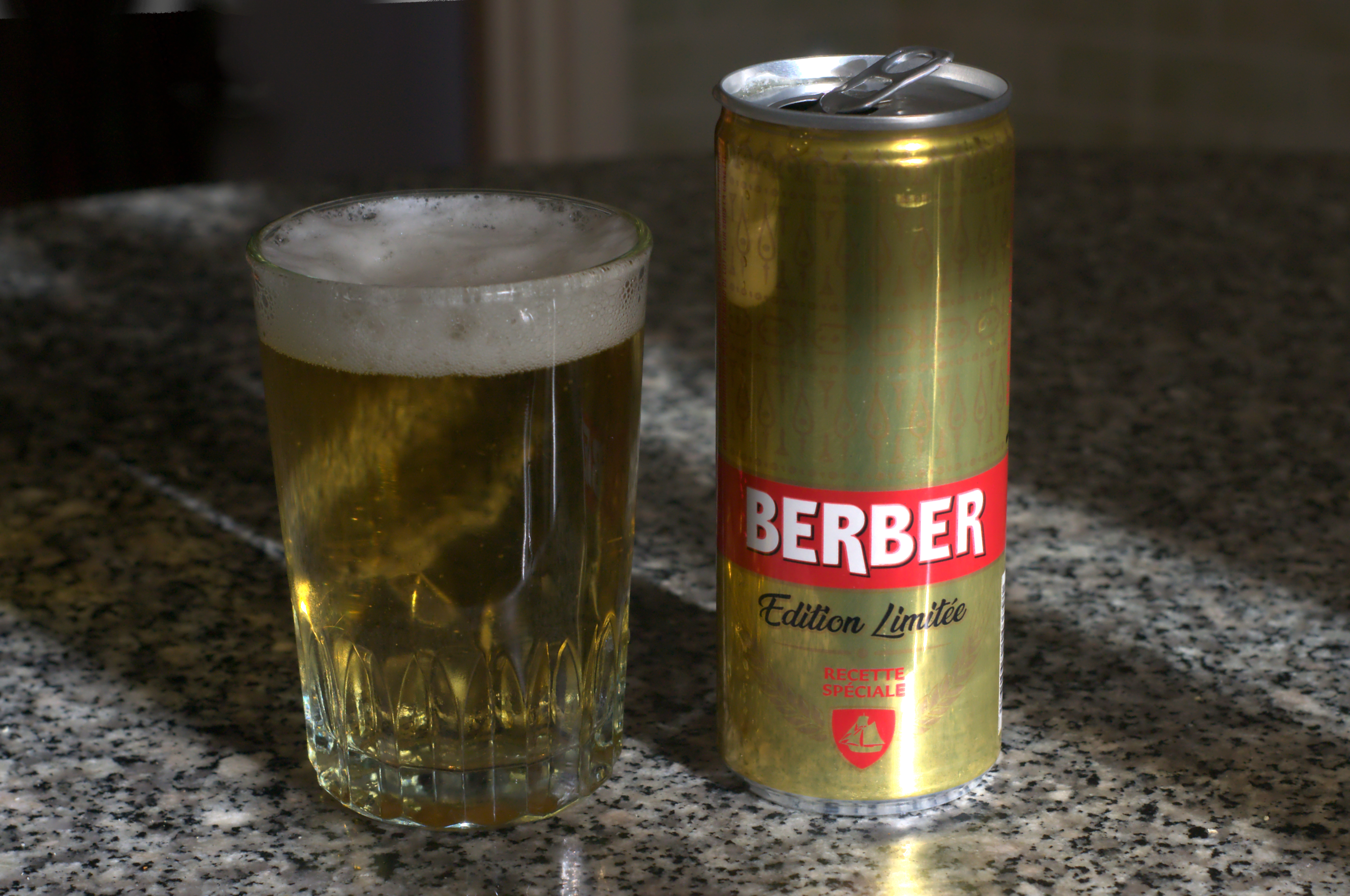 Canette et tasse de bière Berber